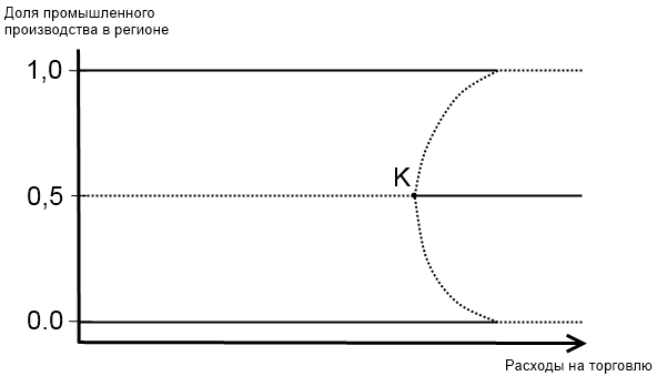 График иллюстрирует модель центра и окраины Пола Кругмана. Непрерывной линией на графике обозначено устойчивое равновесие, а пунктирной — неустойчивое. К — критическая точка (точка бифуркации).